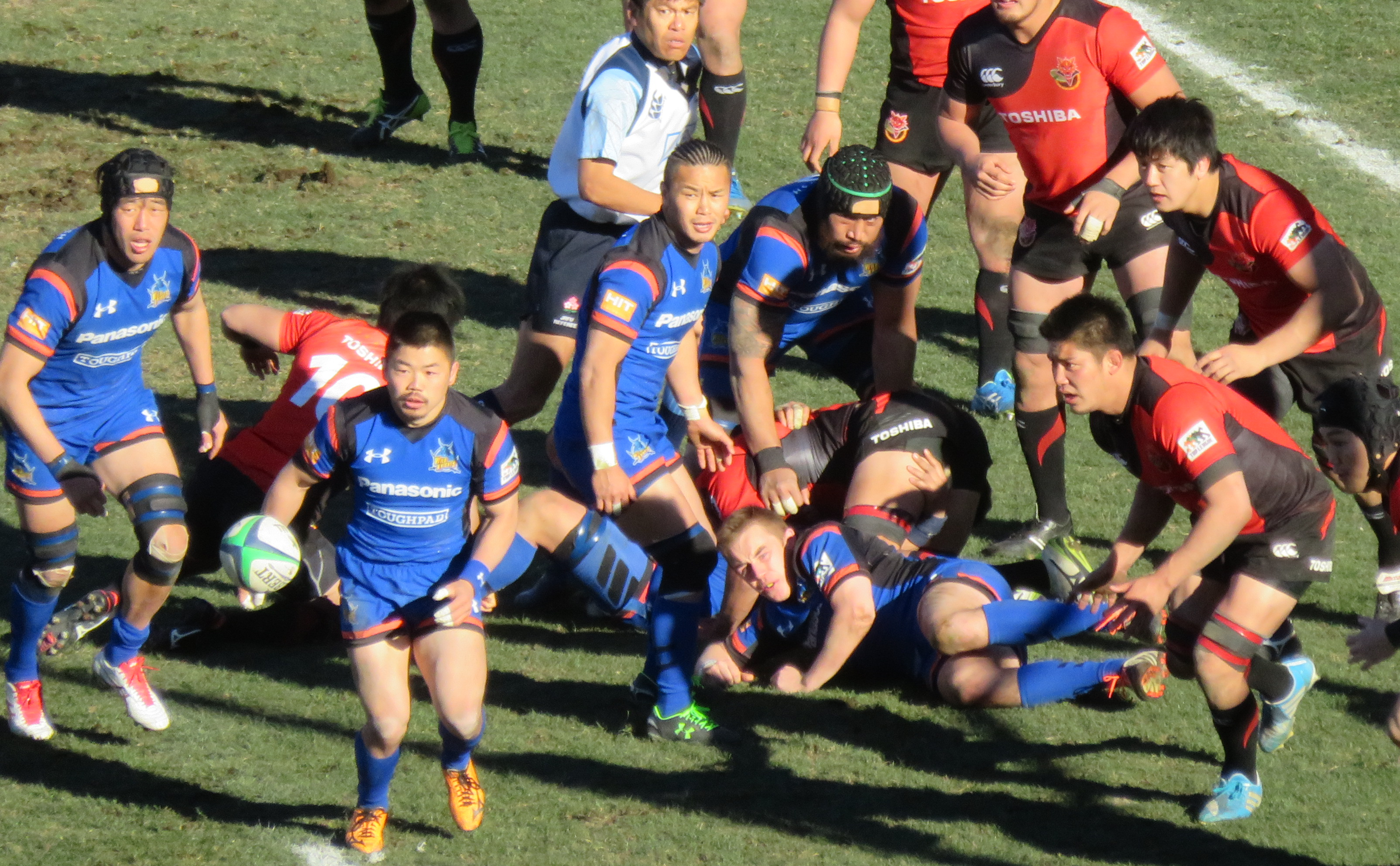 ジャパンラグビートップリーグ2015-2016 パナソニック ワイルドナイツ 対 東芝ブレイブルーパス